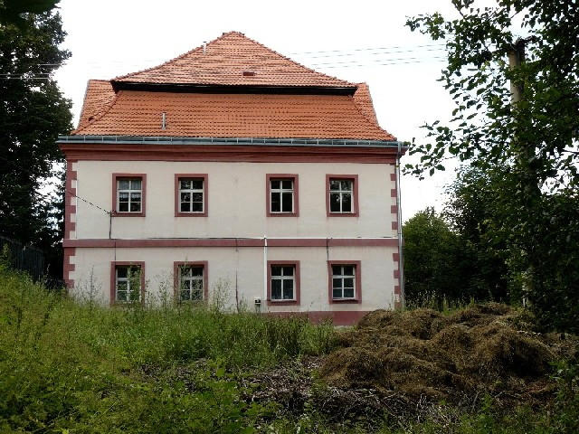 Staré Sedlo-Zámek z jižní strany